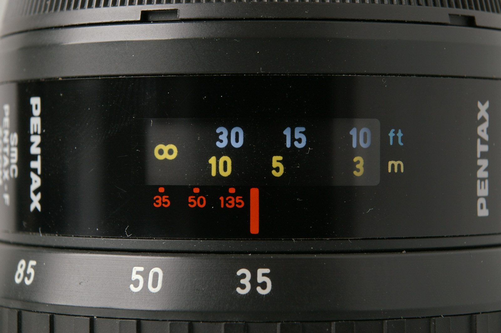 Infrarotindex Pentax-F 3.5-4.5/35-135 mm